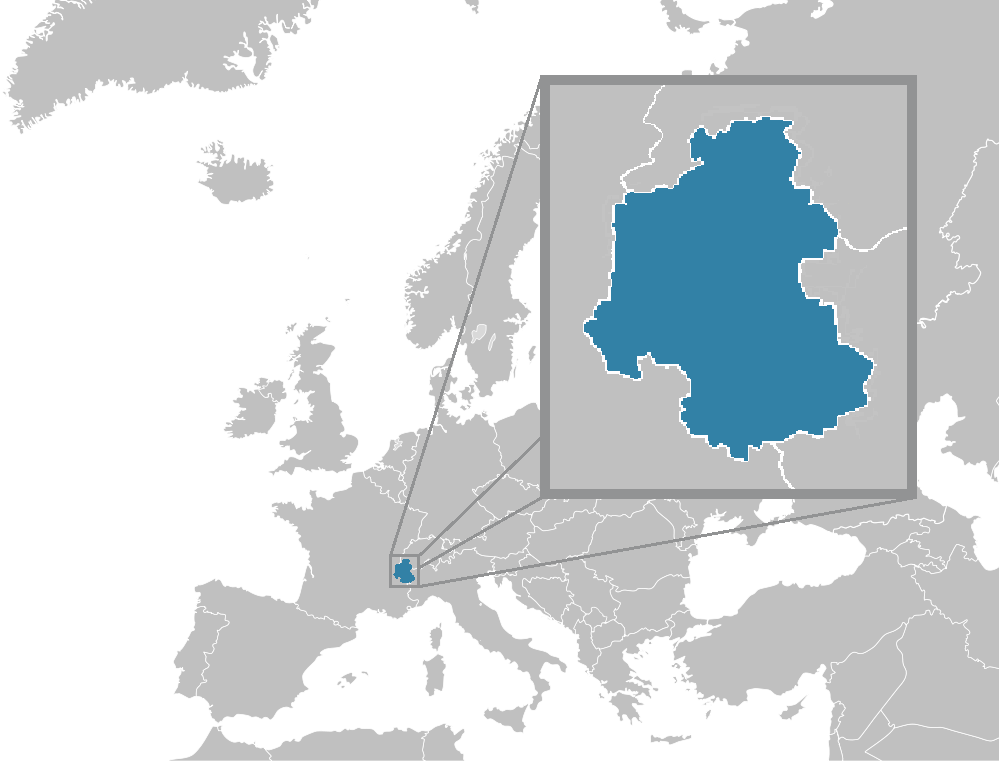 Localisation de la Savoie en Europe.